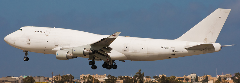 747 atg